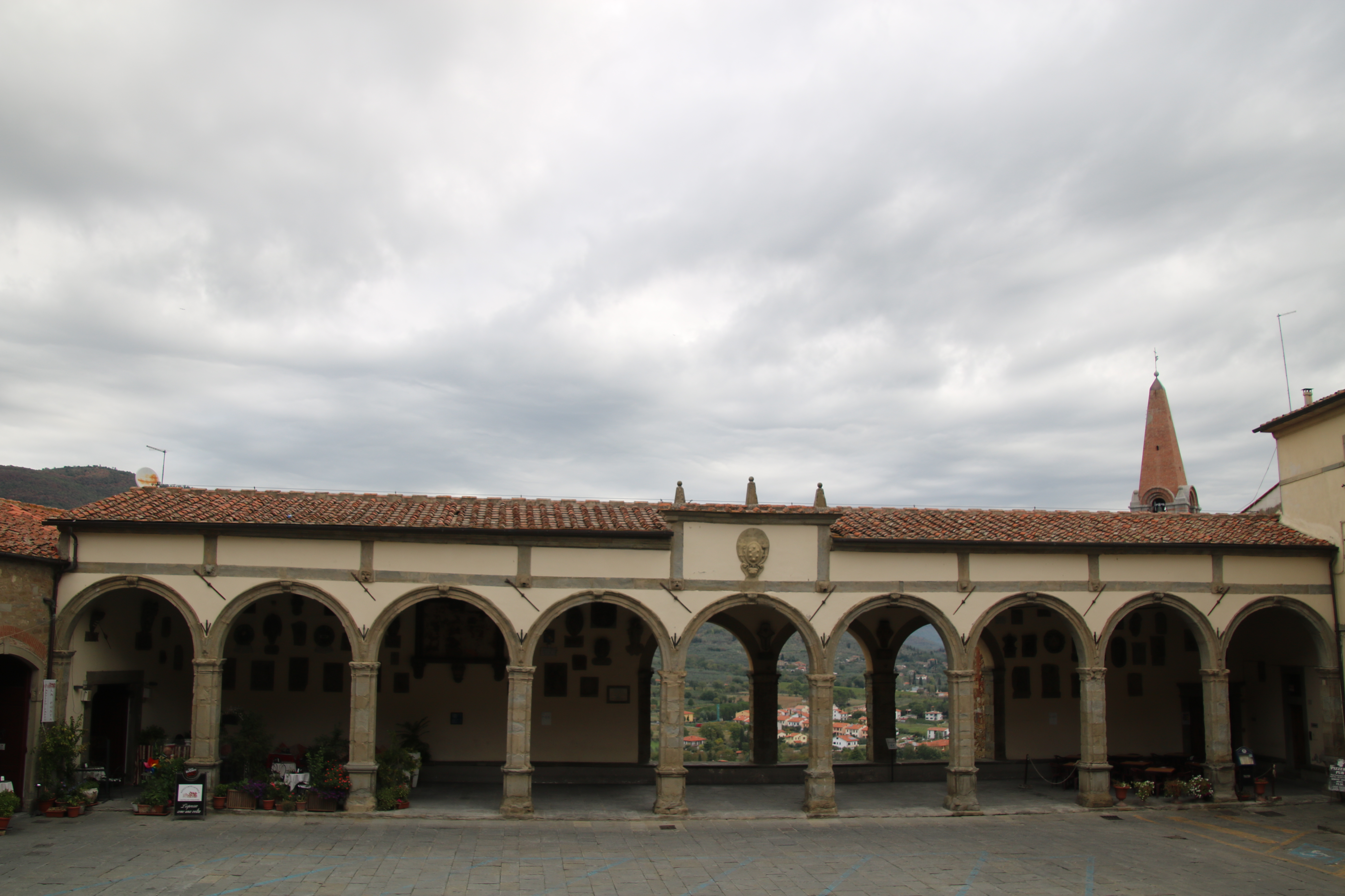 Logge Vasariane (Castiglion Fiorentino)